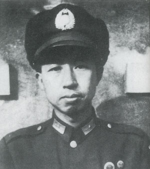 1946年在軍調處沈陽執行小組工作的王首道